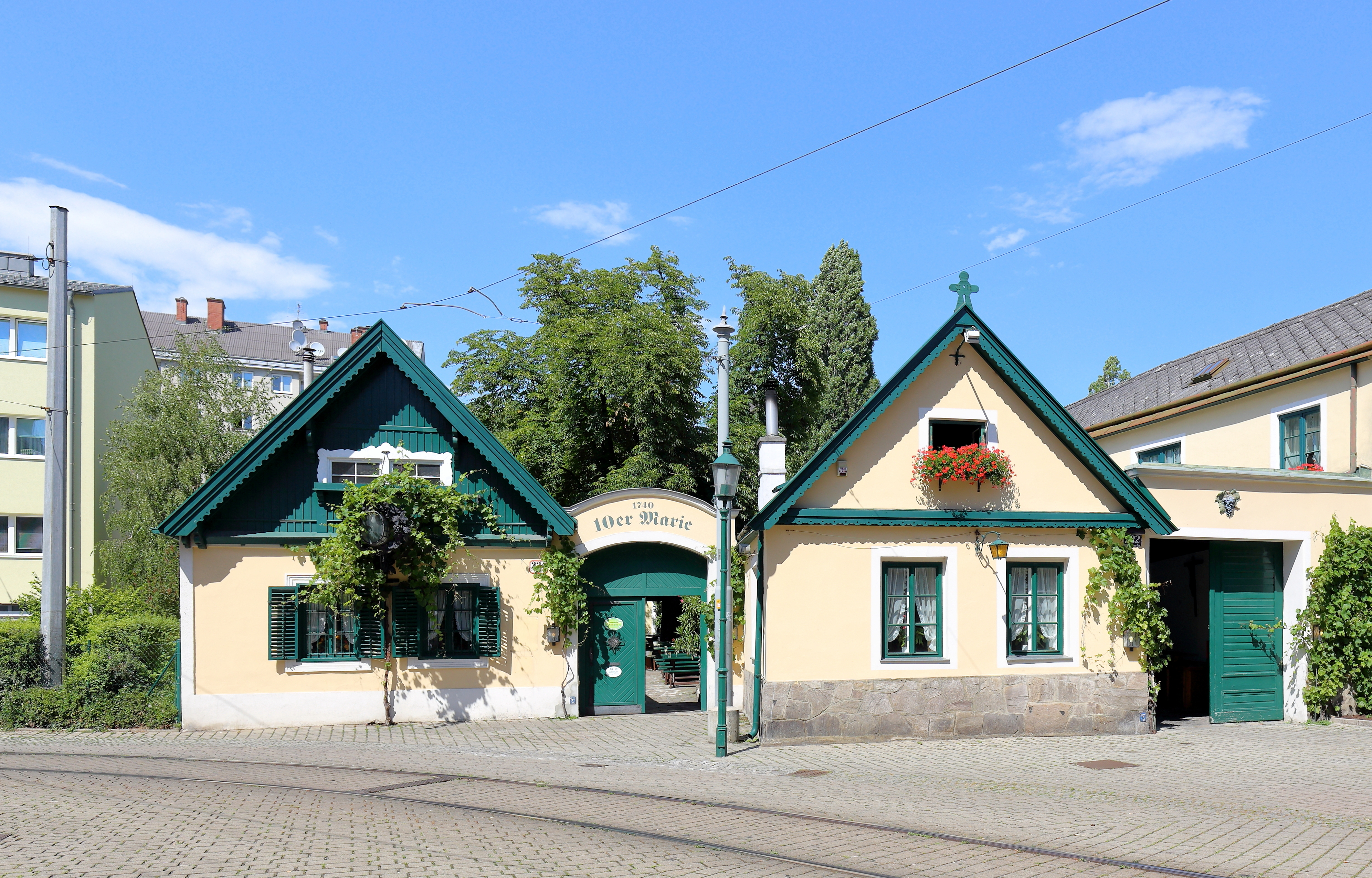 Das Heurigen-Restaurant „10er Marie“ neben der Alt-Ottakringer Pfarrkirche im 16. Wiener Gemeindebezirk Ottakring.Die „10er Marie“ ist einer der bekanntesten Heurigen Wiens außerhalb der bekannten Weinorte Grinzing, Sievering und Neustift am Walde und wurde bereits 1740 urkundlich erwähnt. Der linke Teil des Gebäudekomplexes steht unter Denkmalschutz.